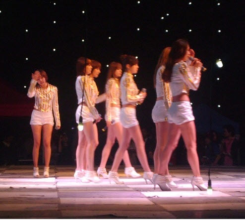 홍대축제에서 공연중인 애프터스쿨